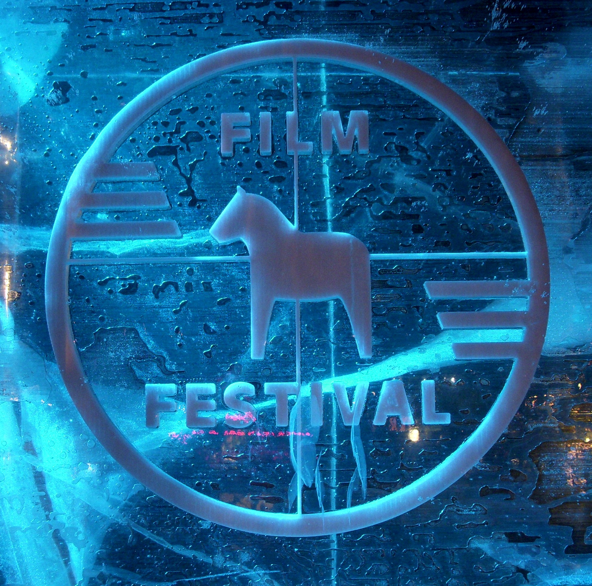 Stockholms filmfestival i Kungsträdgården 21 november 2009